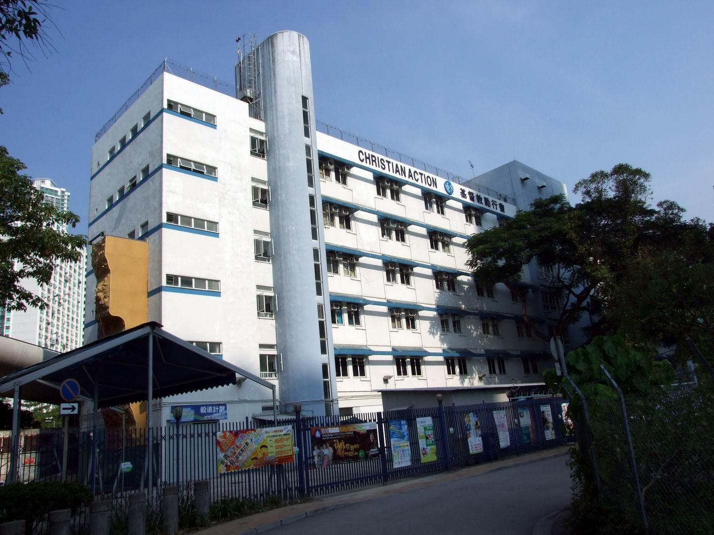 基督教勵行會僱員再培訓中心